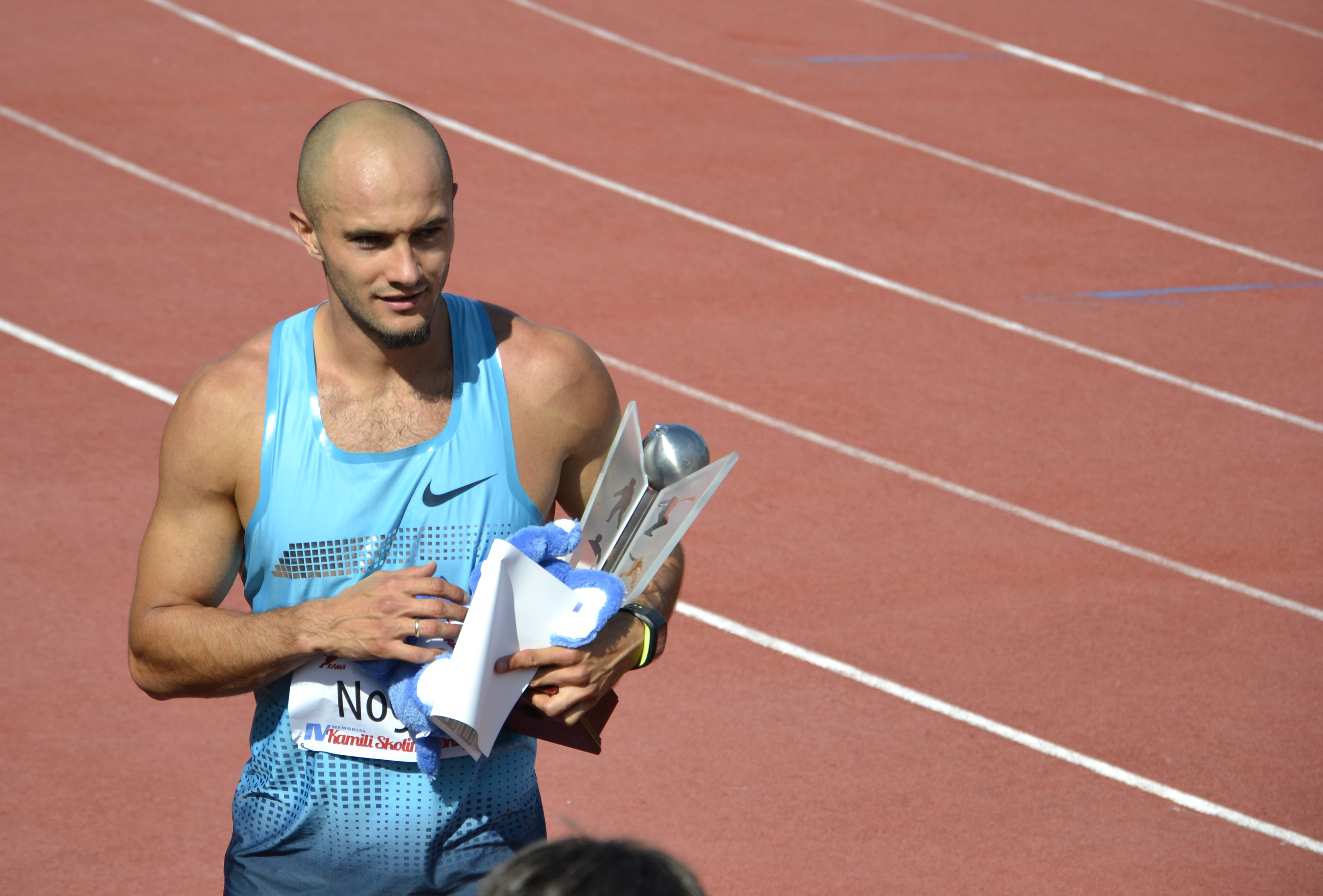 polski lekkoatleta